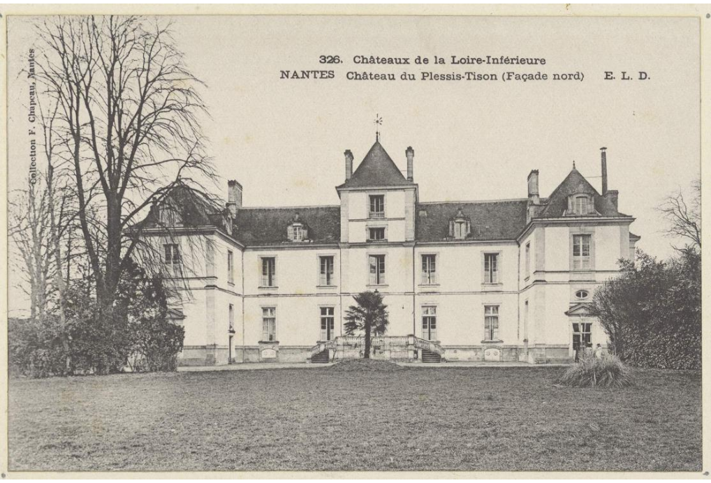 Nantes - Château du Plessis-Tison (façade nord)